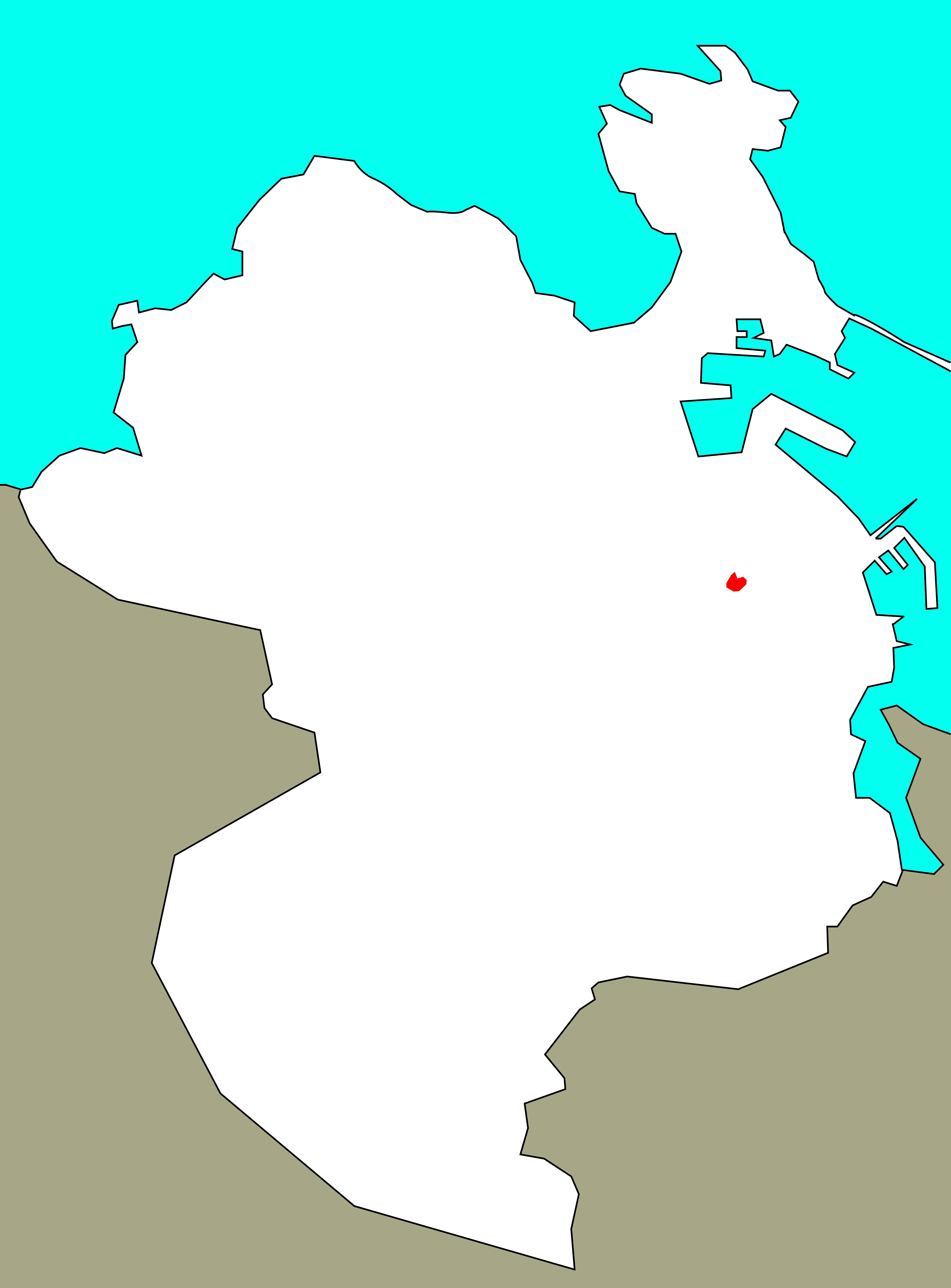 Situación de Agramonte no concello da Coruña, segundo